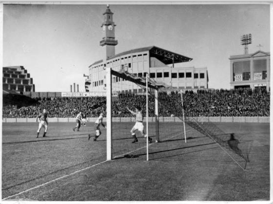 המשחק שמילה גינזבורג כובש את שער הניצחון ההיסטורי "השער של חייו"